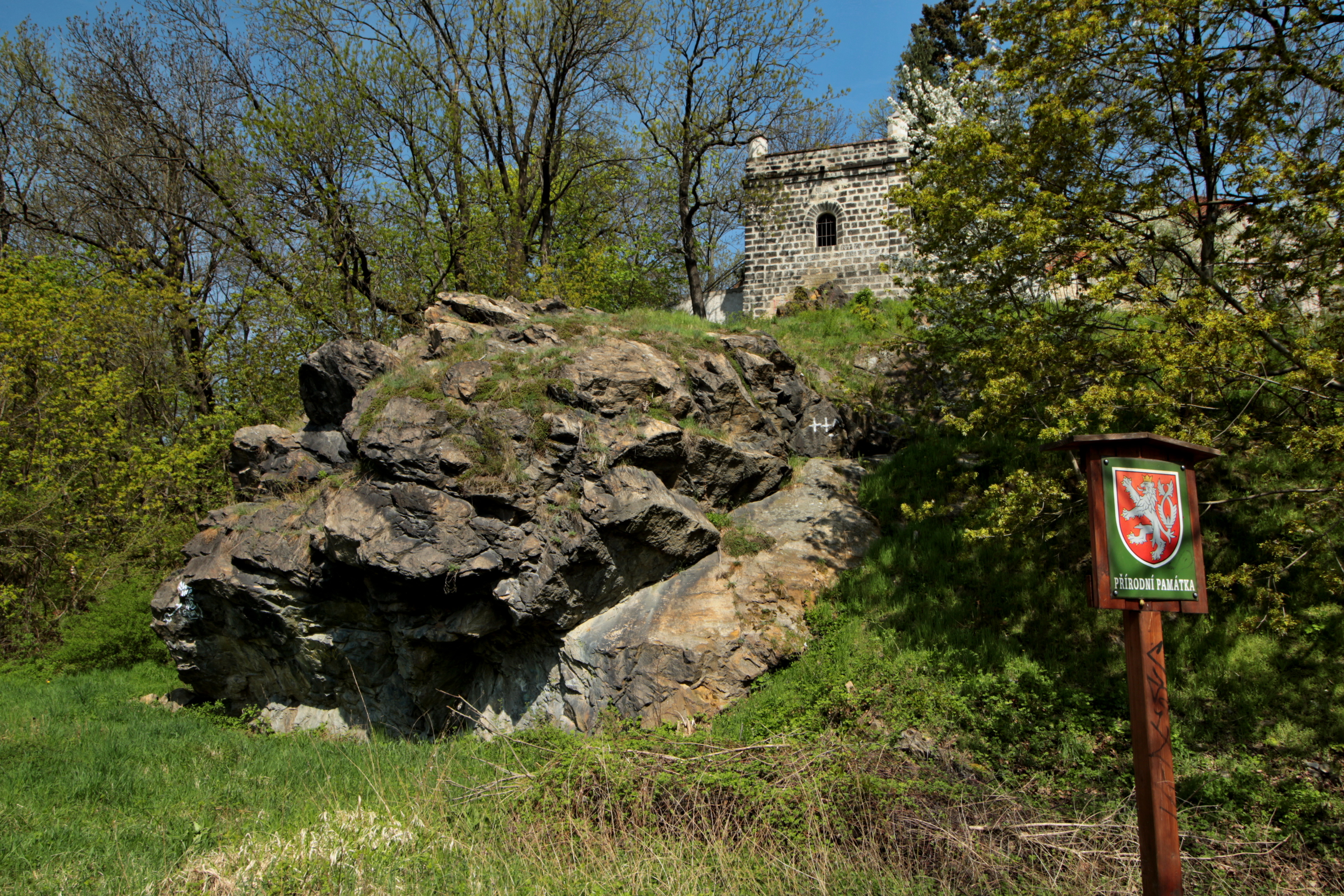 Hloubětín zlom